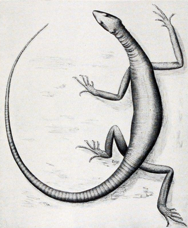 Araeoscelis.